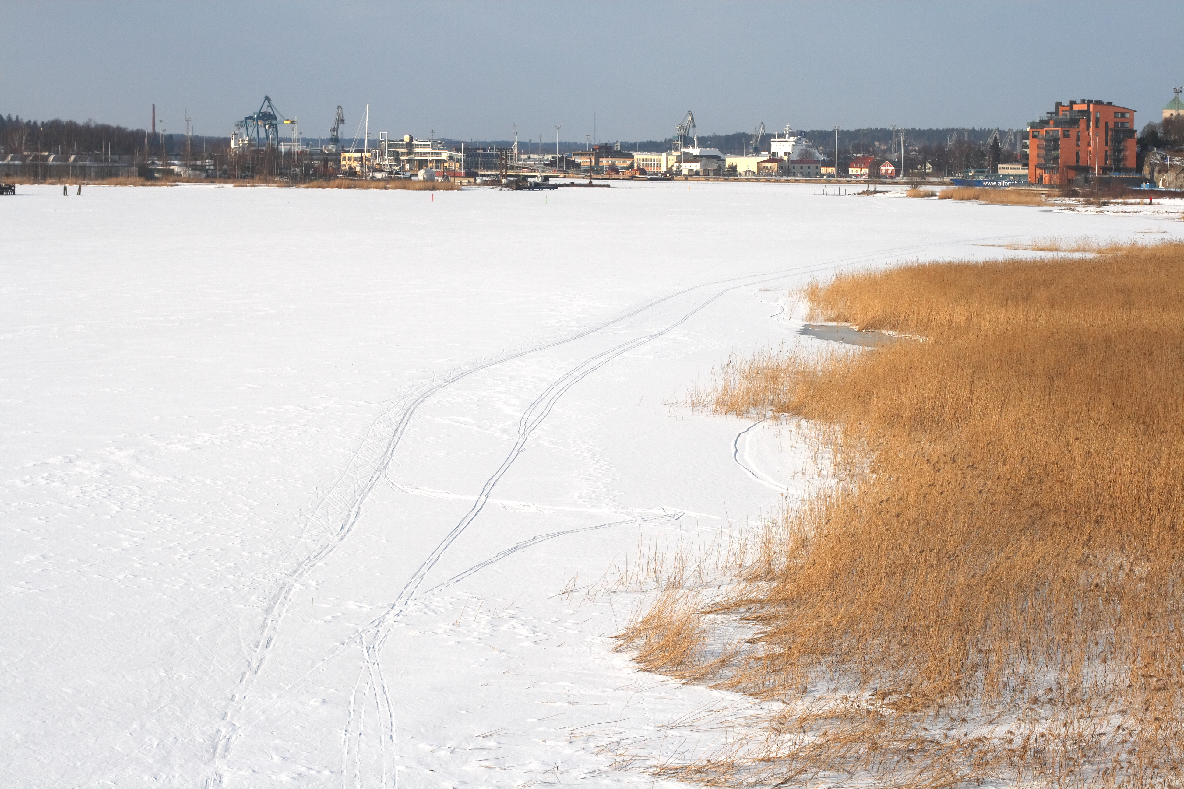 Pitkäsalmi in winter, Turku